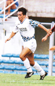 Marco Ferrante durante una partita con il Pisa. Dettaglio da figurina Score 92 (stampata 1991). Licensing Ferrante, Marco Ferrante, Marco